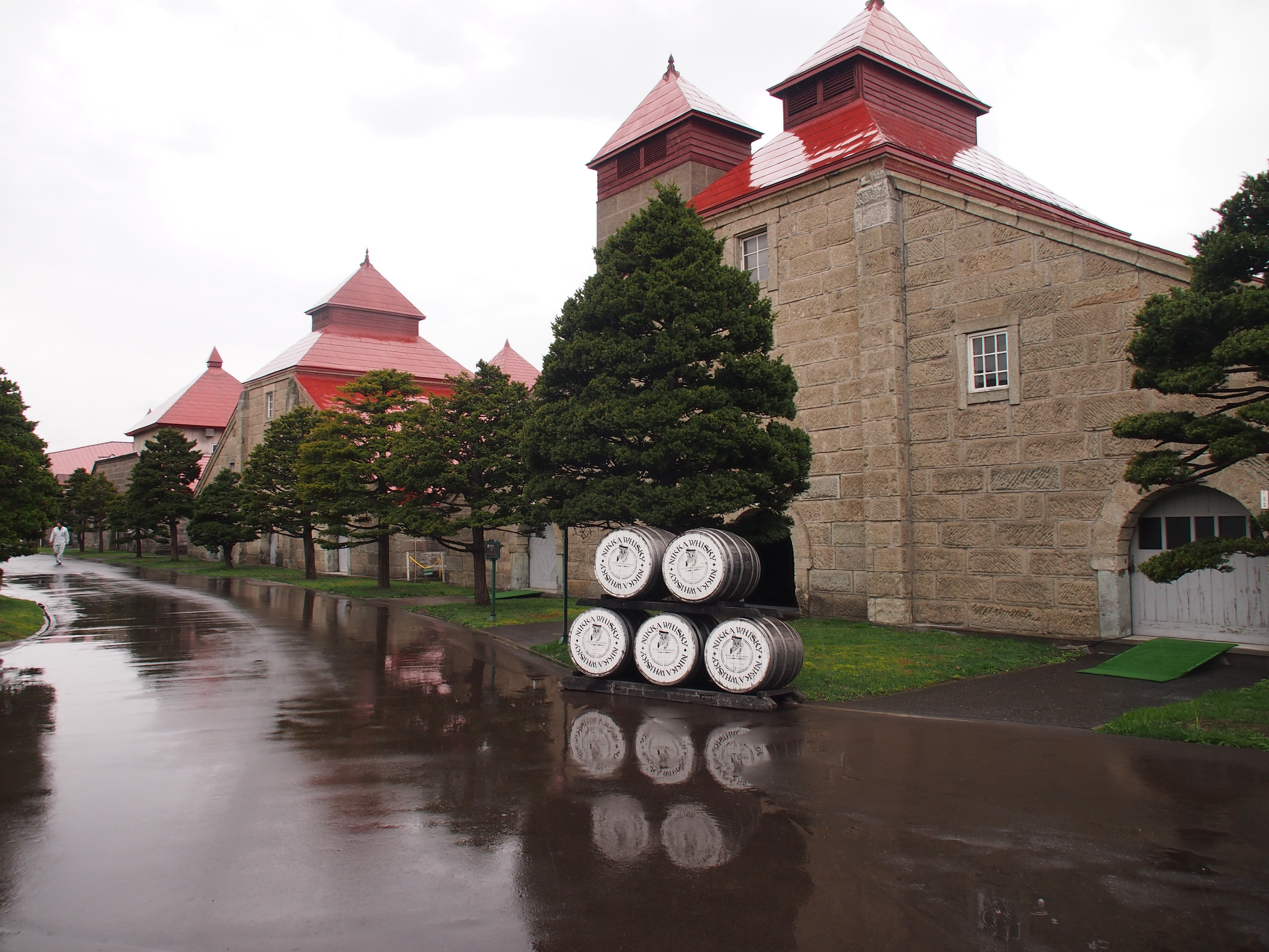 Nikka whisky Hokkaido plant , Yoichi town